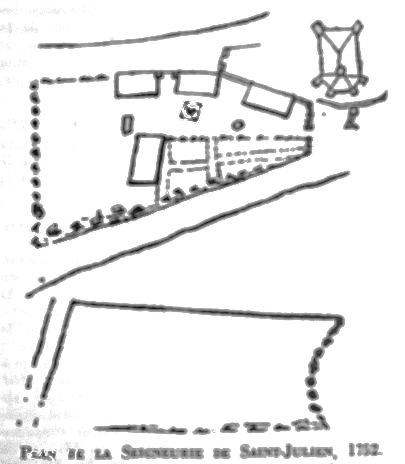 issu du fond de l'Aube.